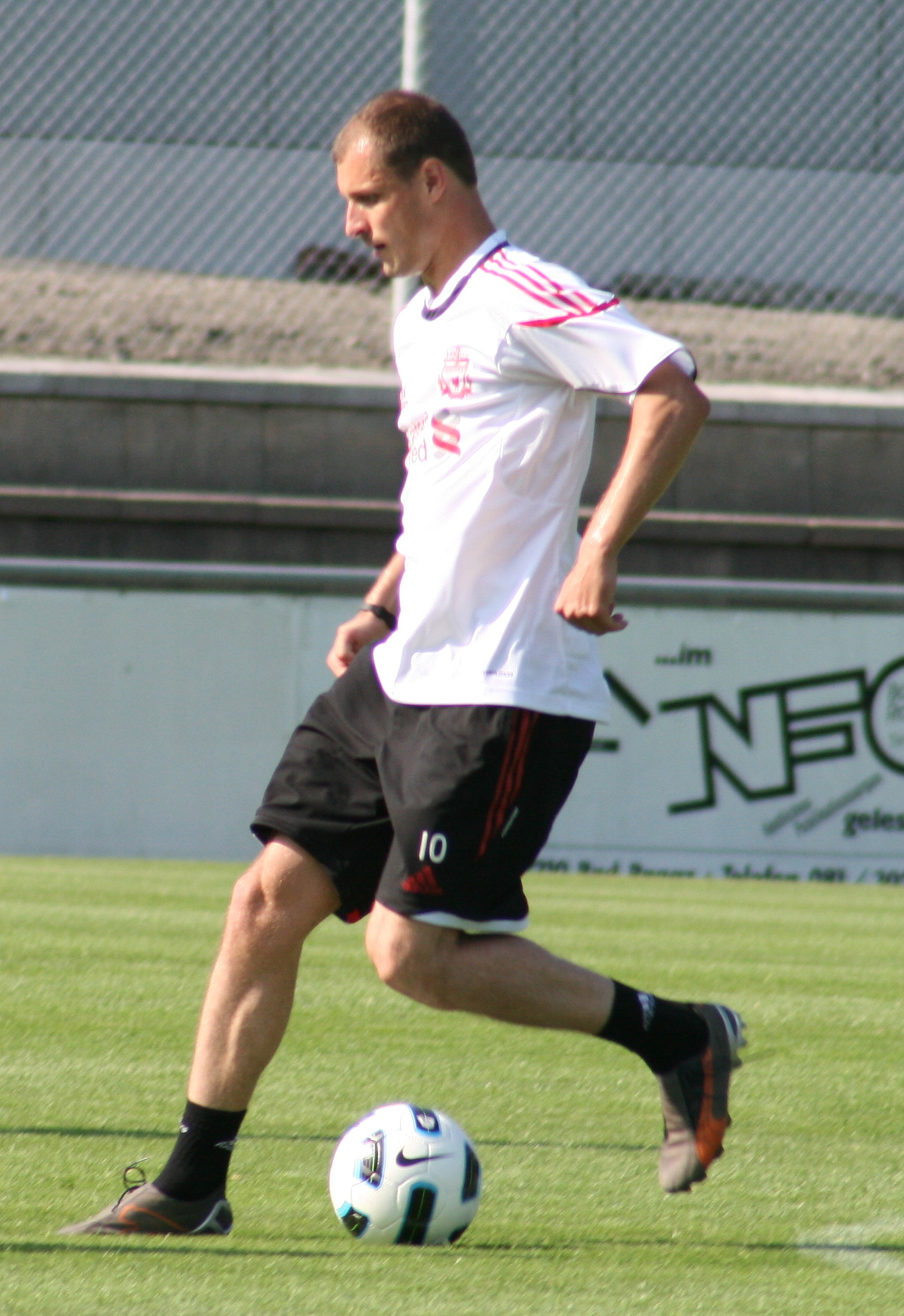 Milan Jovanovic à l'entrainement avec le FC Liverpool.